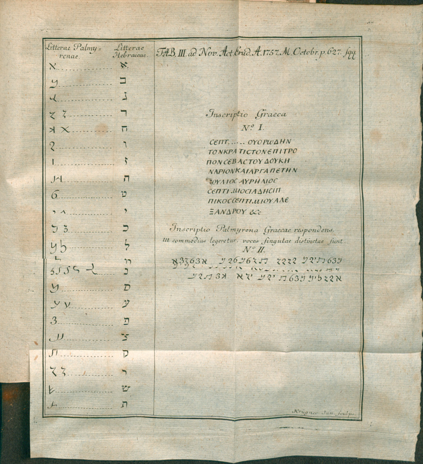 Illustration